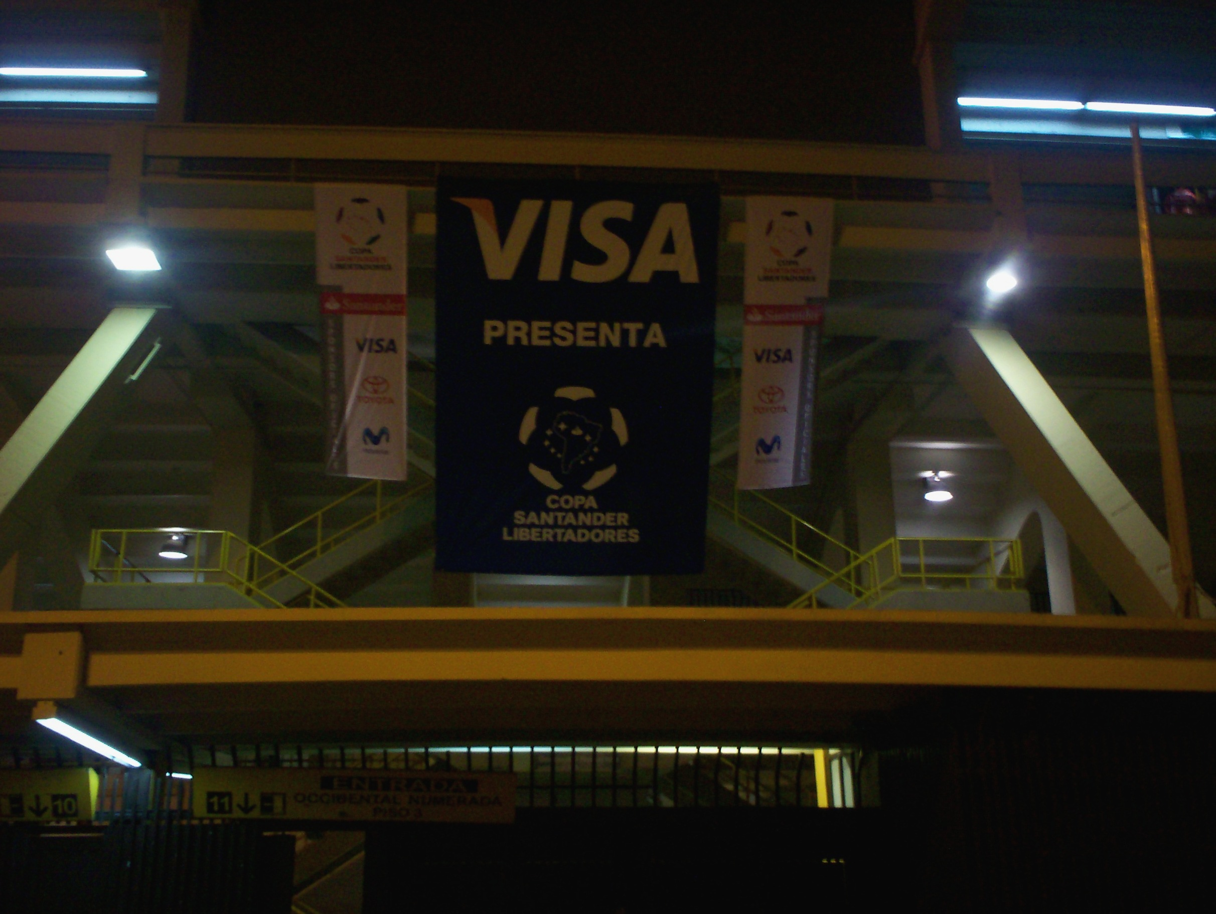 Afueras del Estadio El Campín, Copa Libertadores 2008, Boyacá Chicó vs. Audax Italiano